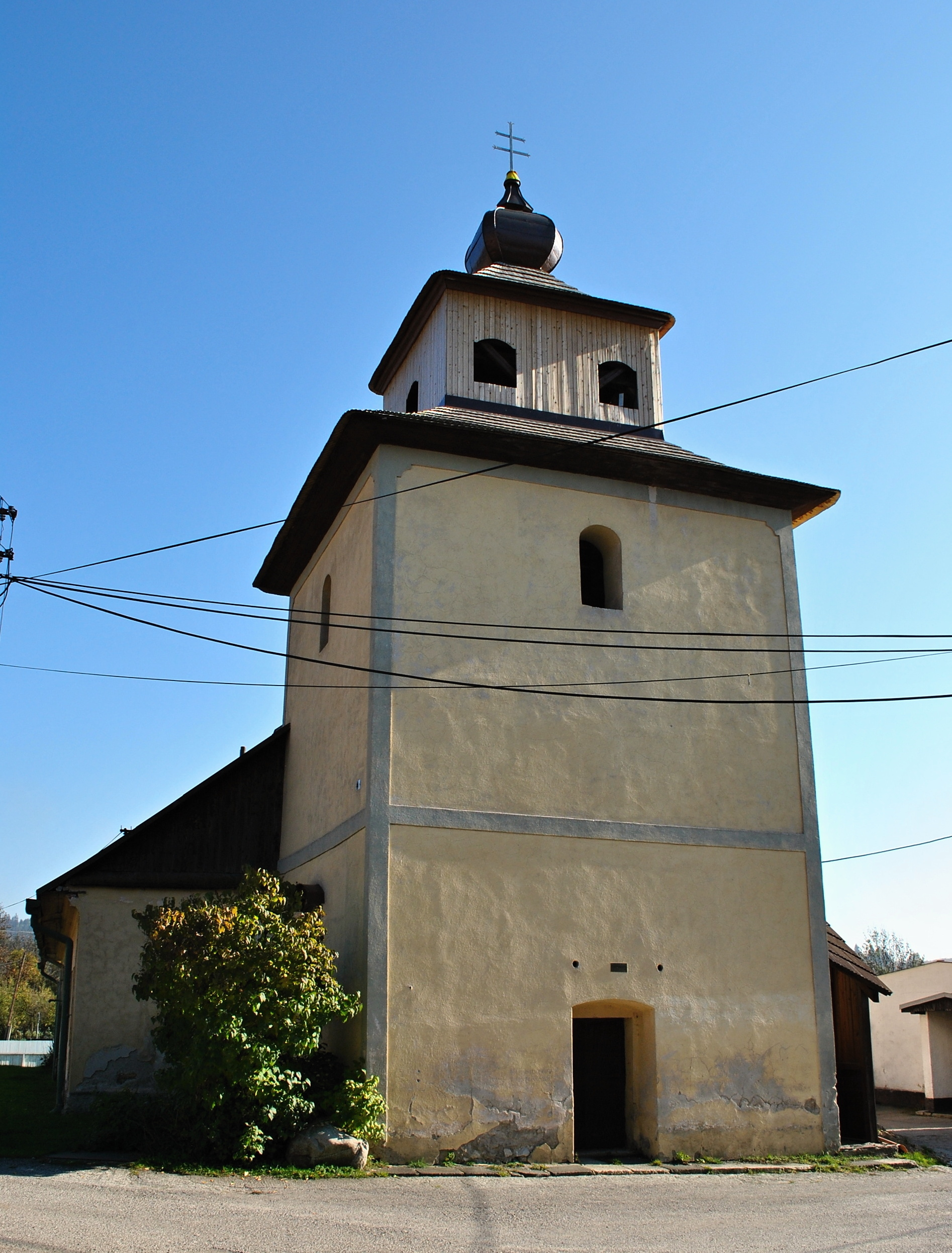 Zvonica